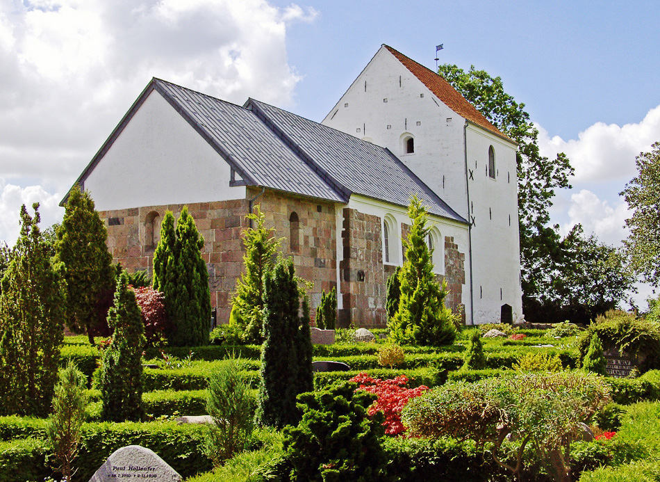 fra nordøst